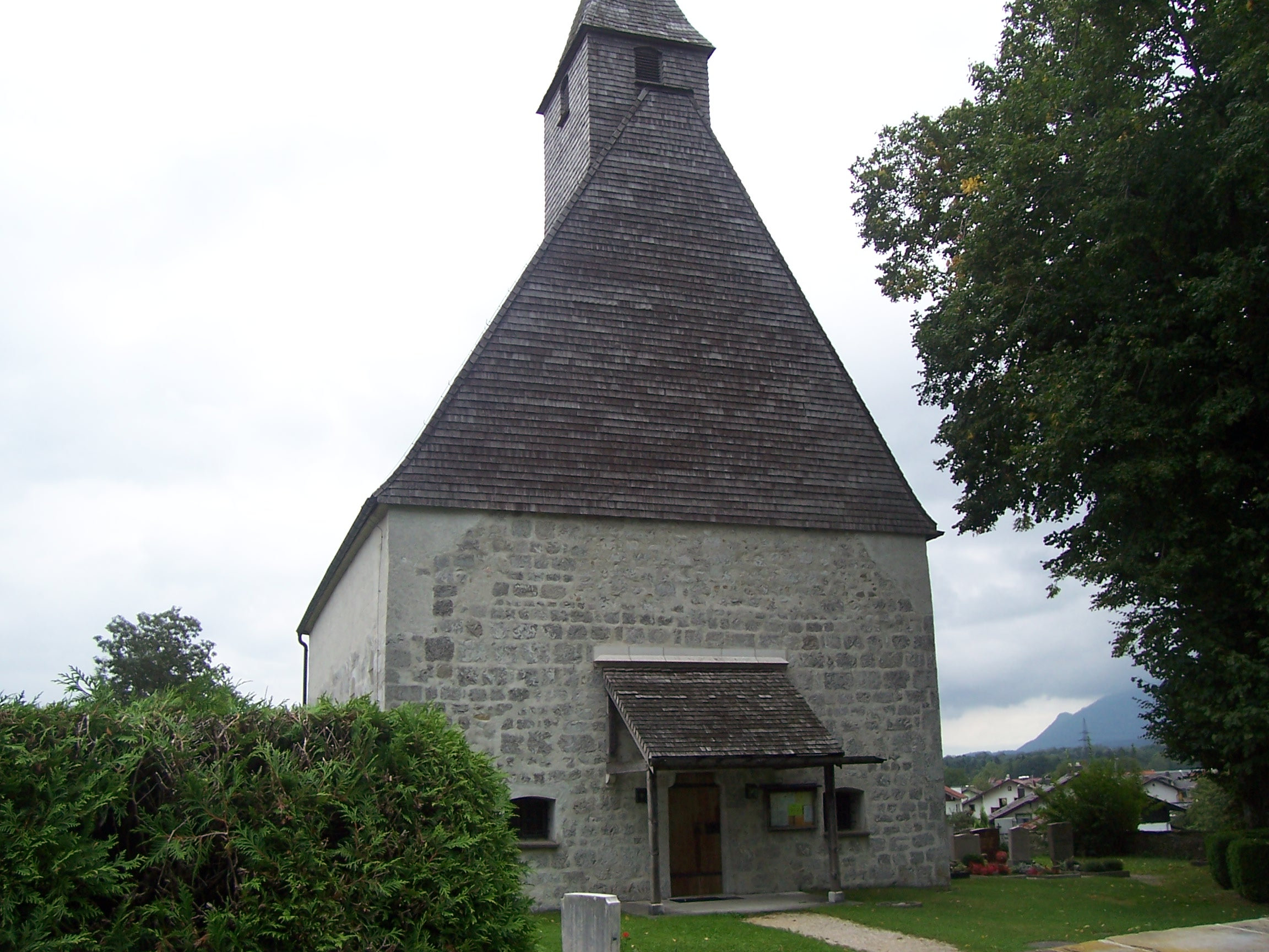 St. Laurentius in Piding Mauthausen Bei Verwendung bitte ich hier um einen Hinweis, wo das Foto genutzt wird.